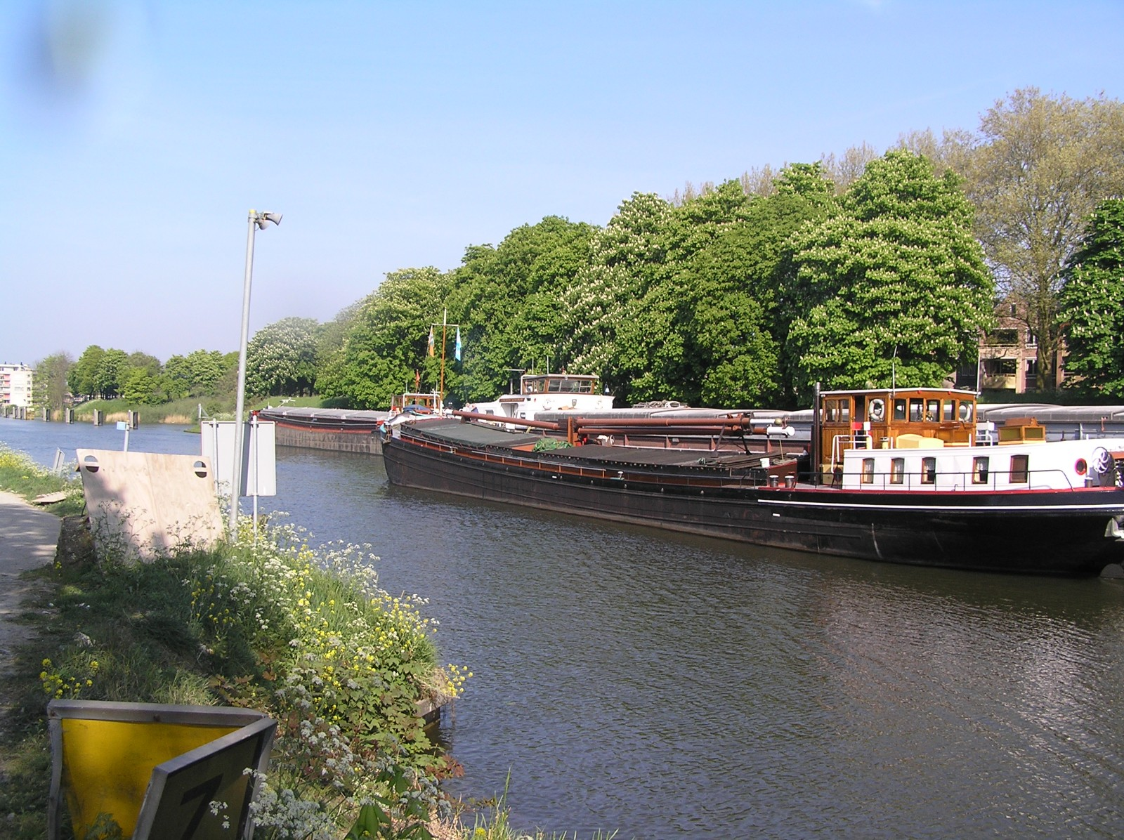 De Terra Nova in het Merwedekanaal bij Gorinchem Categorie:Binnenvaart